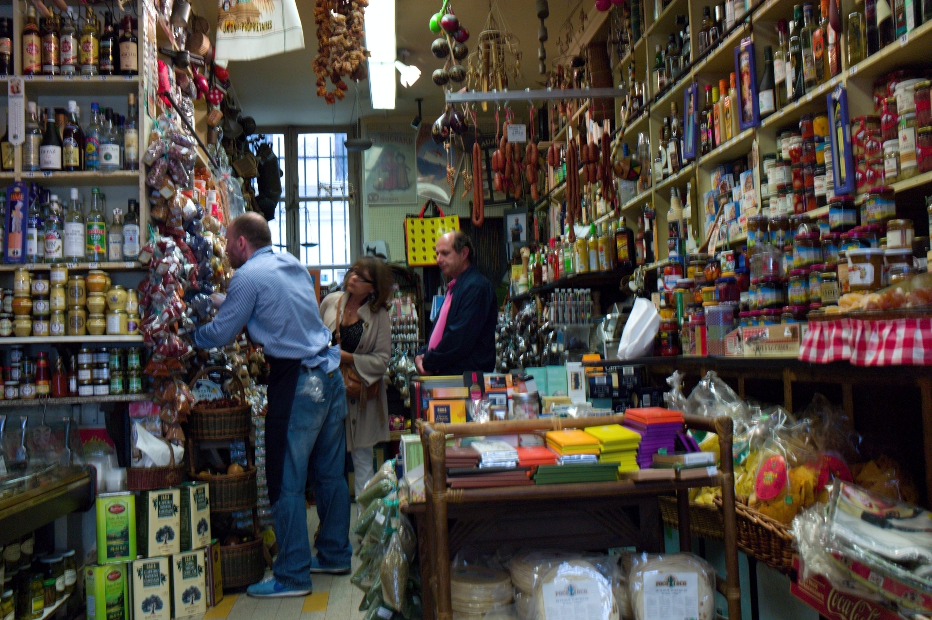 Intérieur de l'épicerie Izrael à Paris (France).